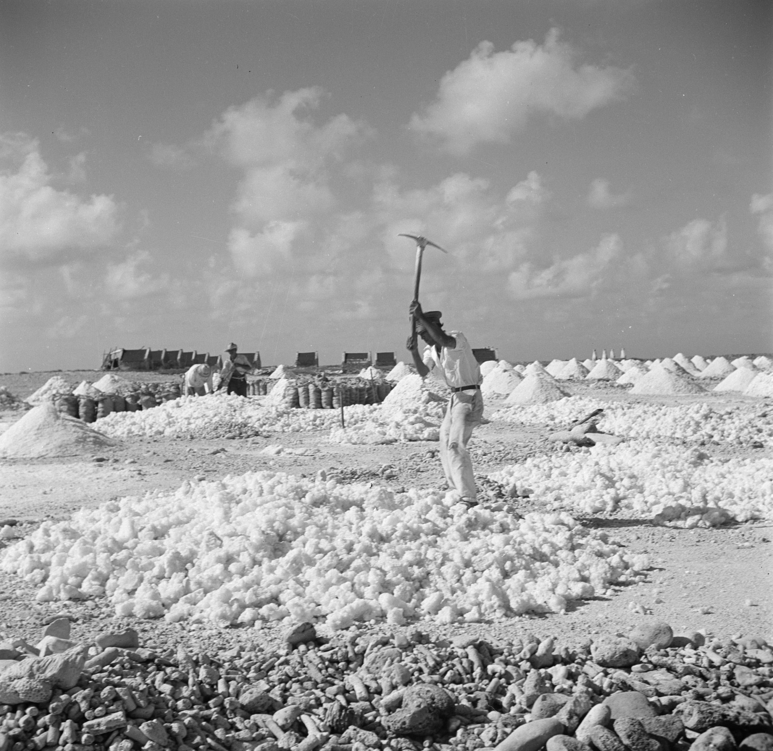 Collectie / Archief : Fotocollectie Van de Poll Reportage / Serie : Reis naar Suriname en de Nederlandse Antillen Beschrijving : Arbeiders aan het werk in de zoutpannen op Bonaire Datum : 1947 Locatie : Bonaire, Nederlandse Antillen Trefwoorden : arbeiders, zoutwinning Fotograaf : Poll, Willem van de, [onbekend] Auteursrechthebbende : Nationaal Archief Materiaalsoort : Negatief (zwart/wit) Nummer archiefinventaris : bekijk toegang 2.24.14.02 Bestanddeelnummer : 252-8398